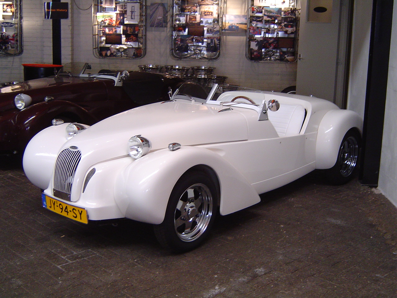 Burton kitcar op basis van een Citroën 2cv. Auteur: Frank Kam, 2004 Licensing Categorie:Afbeelding auto